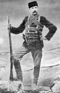 Мецн Мурад (Амбарцум Бояджан)